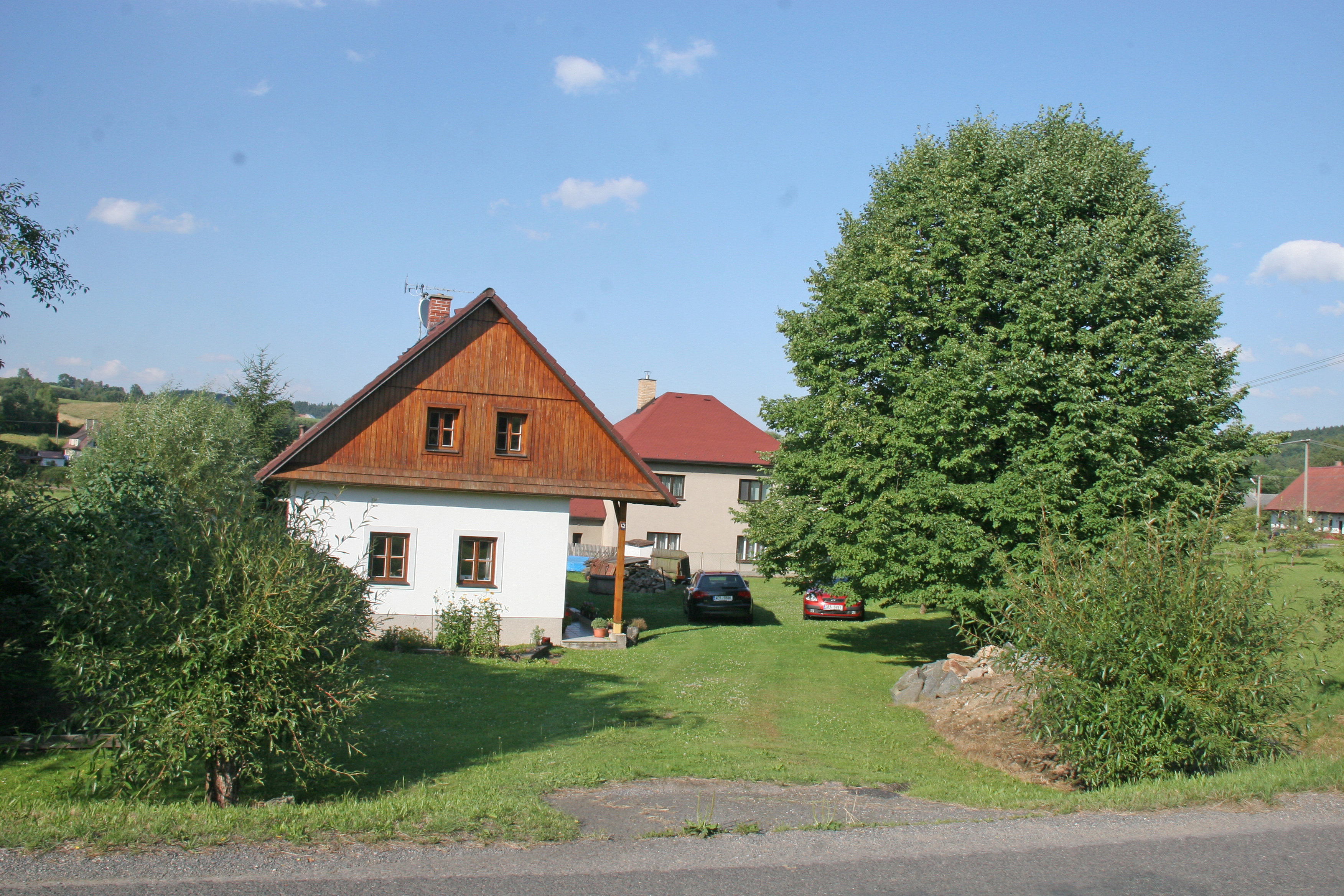 Horní Bezděkov čp. 42